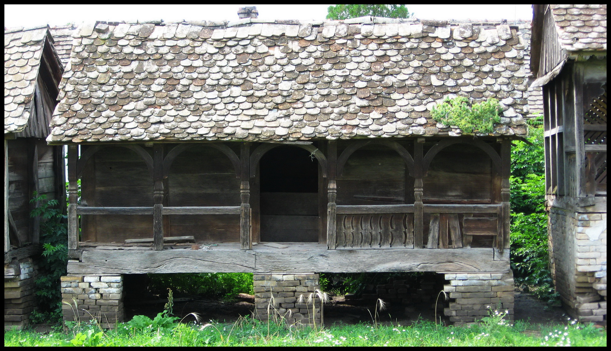 Ambar iz 1885. godine